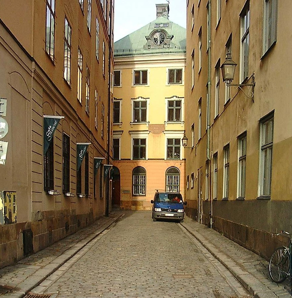 Gaffelgränd viewed from Skeppsbron.